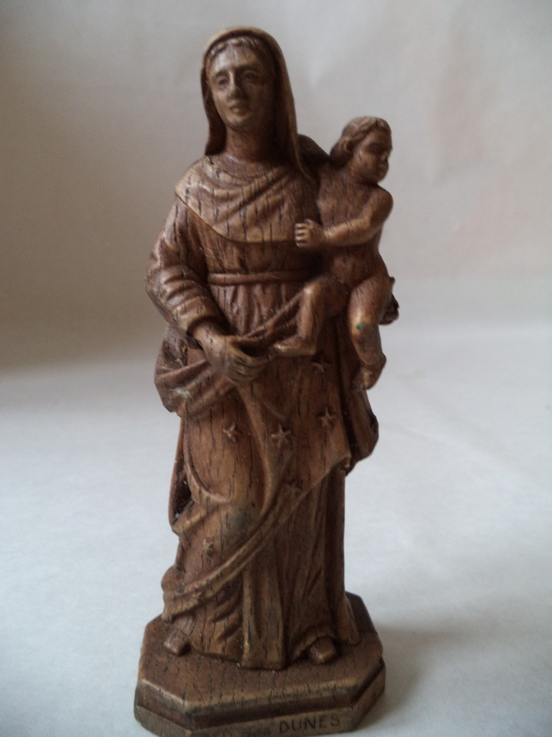 Statuette en liège de la patronne des pêcheurs de Dunkerque